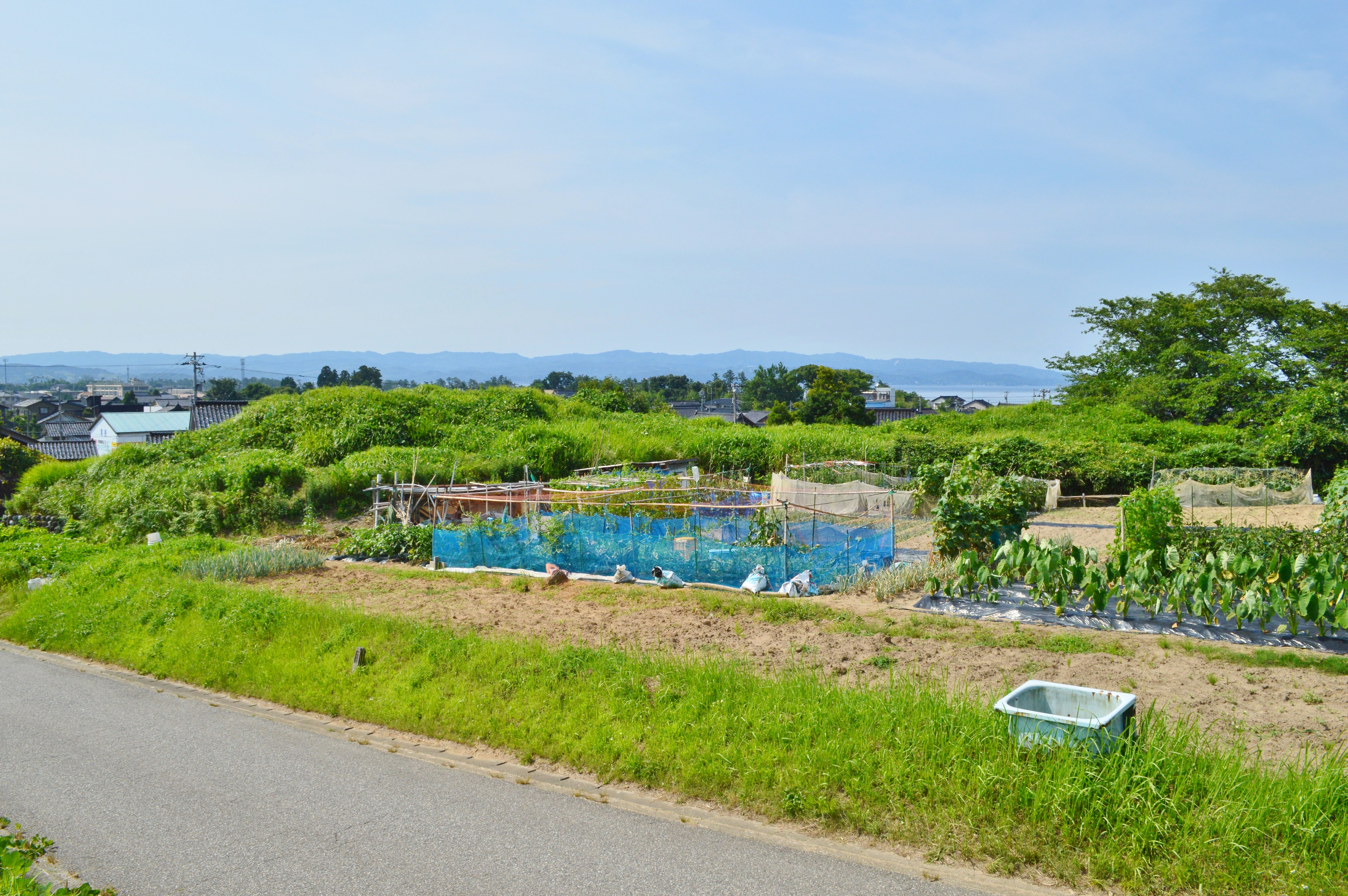 桜谷1号墳 (高岡市) 墳丘